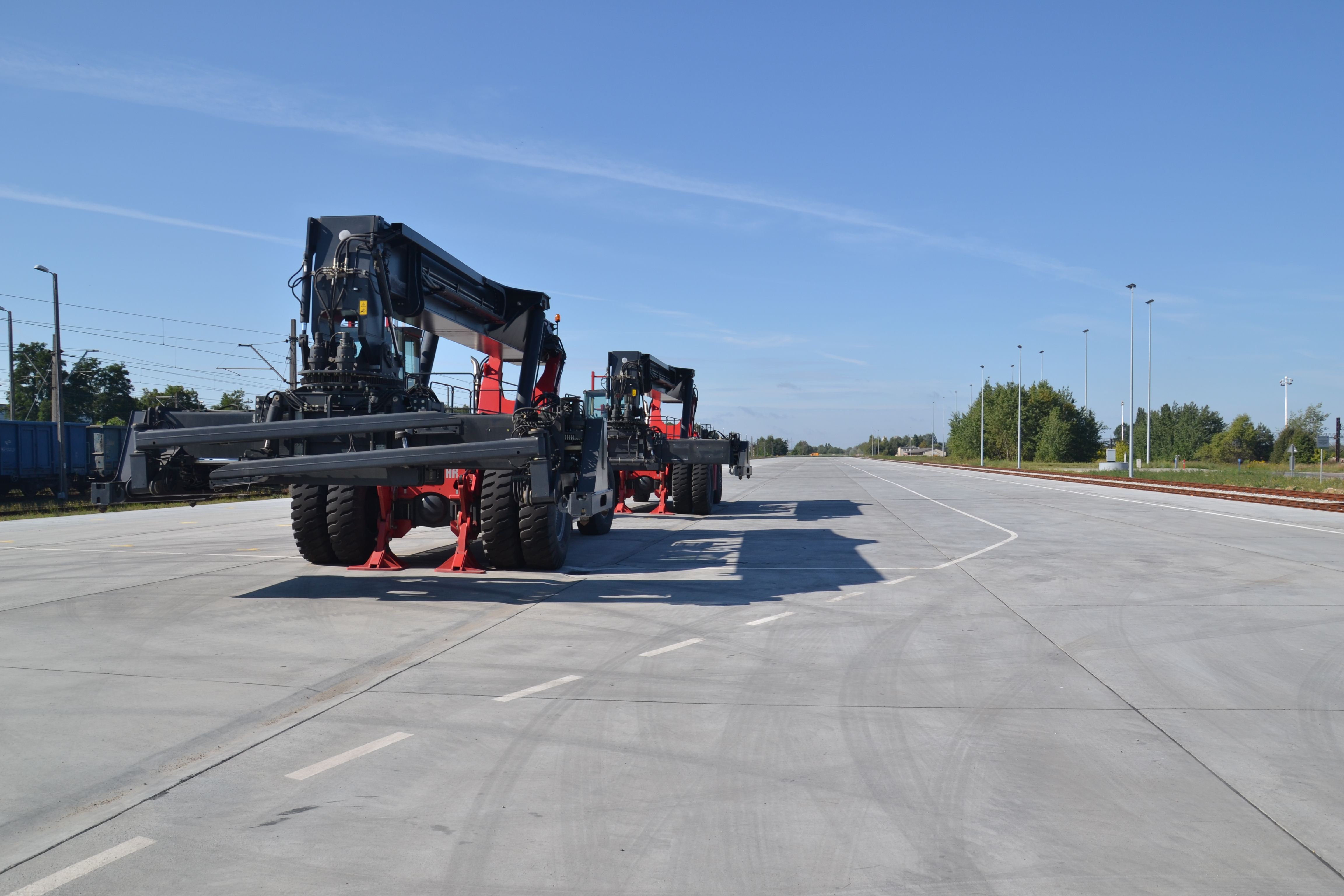 Płyta terminala kontenerowego Poznań Franowo